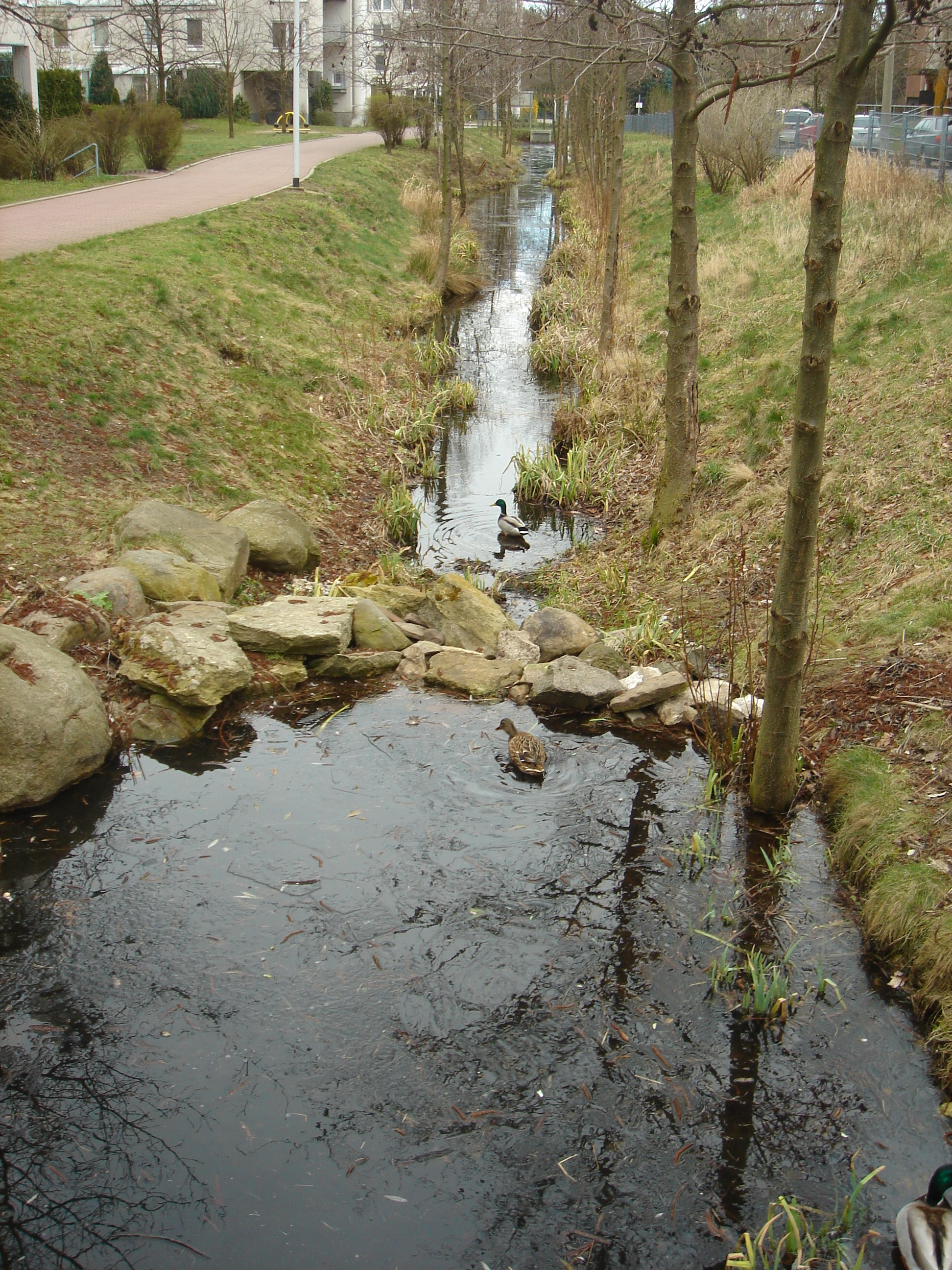 Floessertgraben in Dresden-Klotzsche – renaturiert